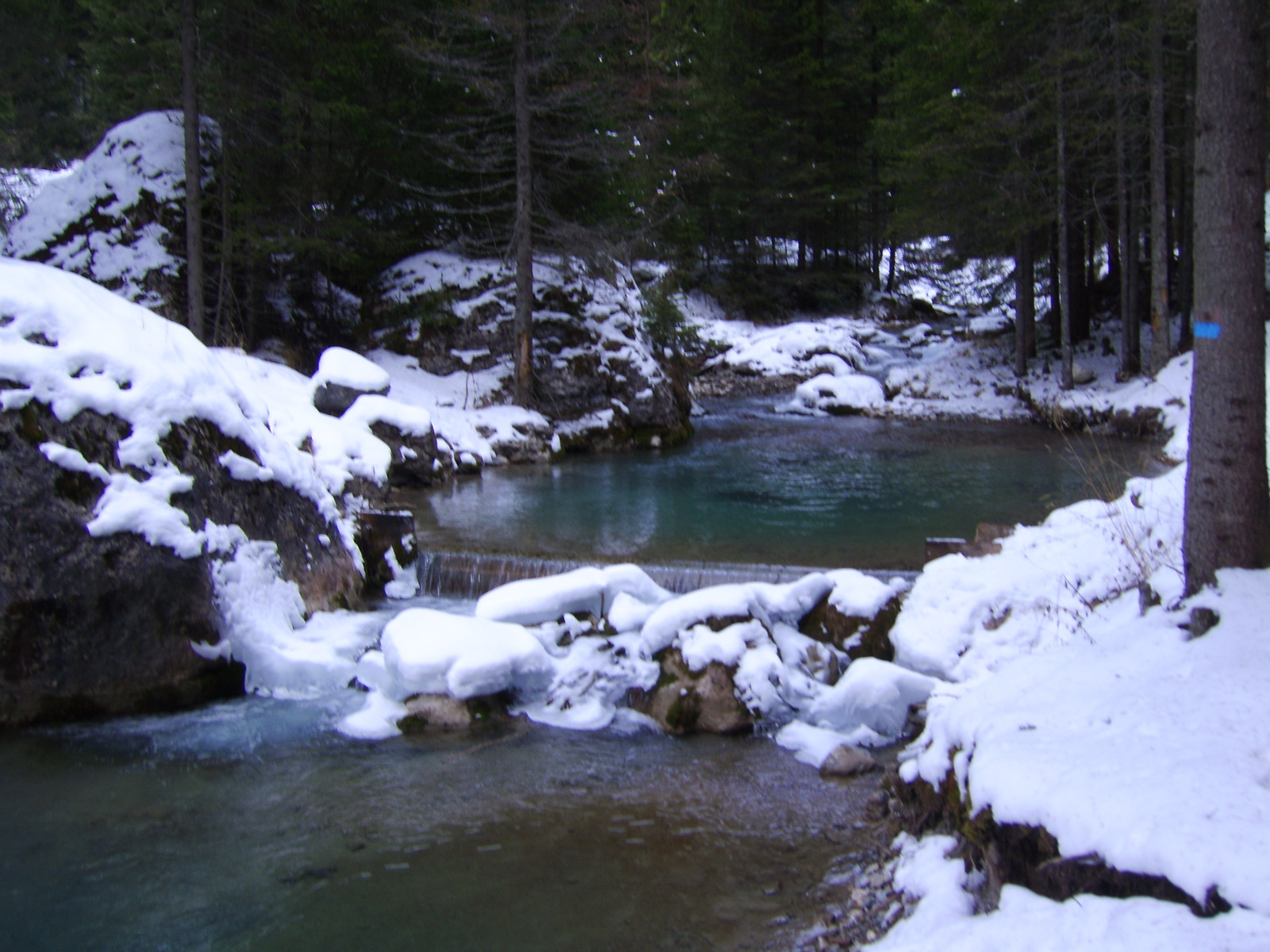 Val San Nicolò